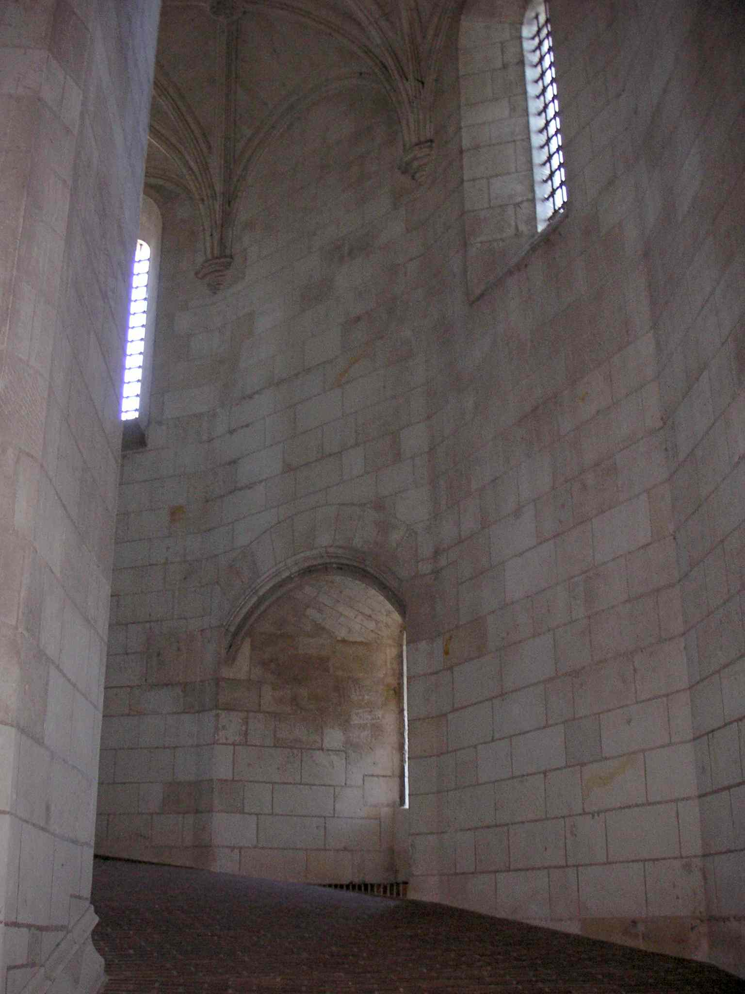 Vue intérieure de la tour des Minimes, le passage est large afin de laisser passer le roi à cheval. Château d'Amboise. Auteur : LonganimE